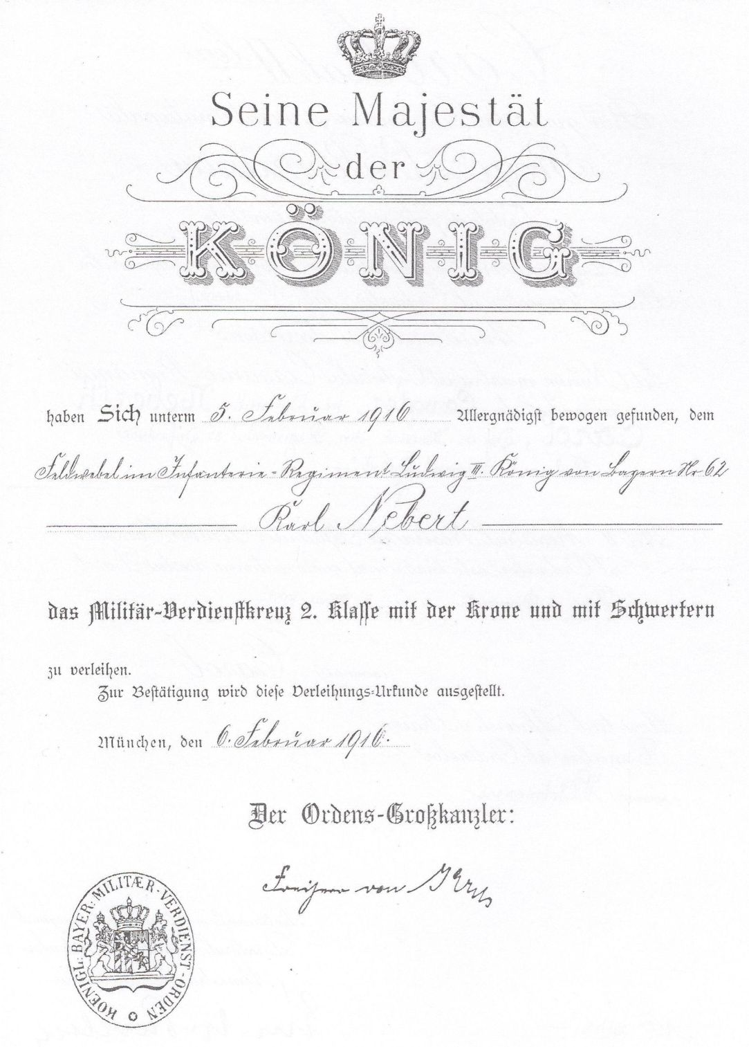 Vyznamenání od Ludvíka III., krále bavorského 1916